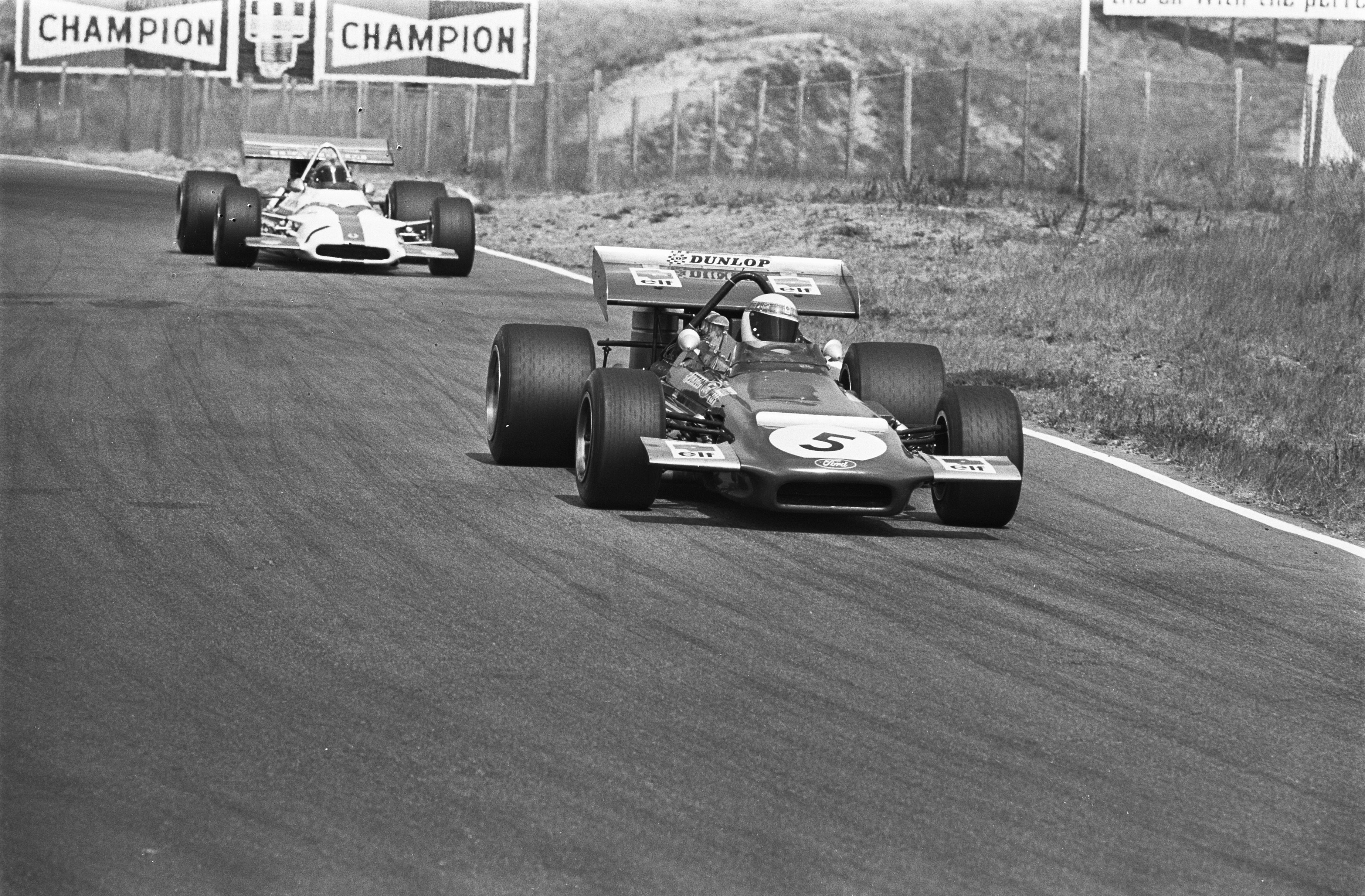 Grand Prix 1970 voor Formule I wagens te Zandvoort; eerste trainingsdag; Jackie Stewart (nr. 5) en achter hem Pedro Rodriquez (nr. 1) in aktie.